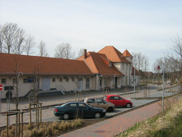 Stacja kolejowa Bansin Seebad